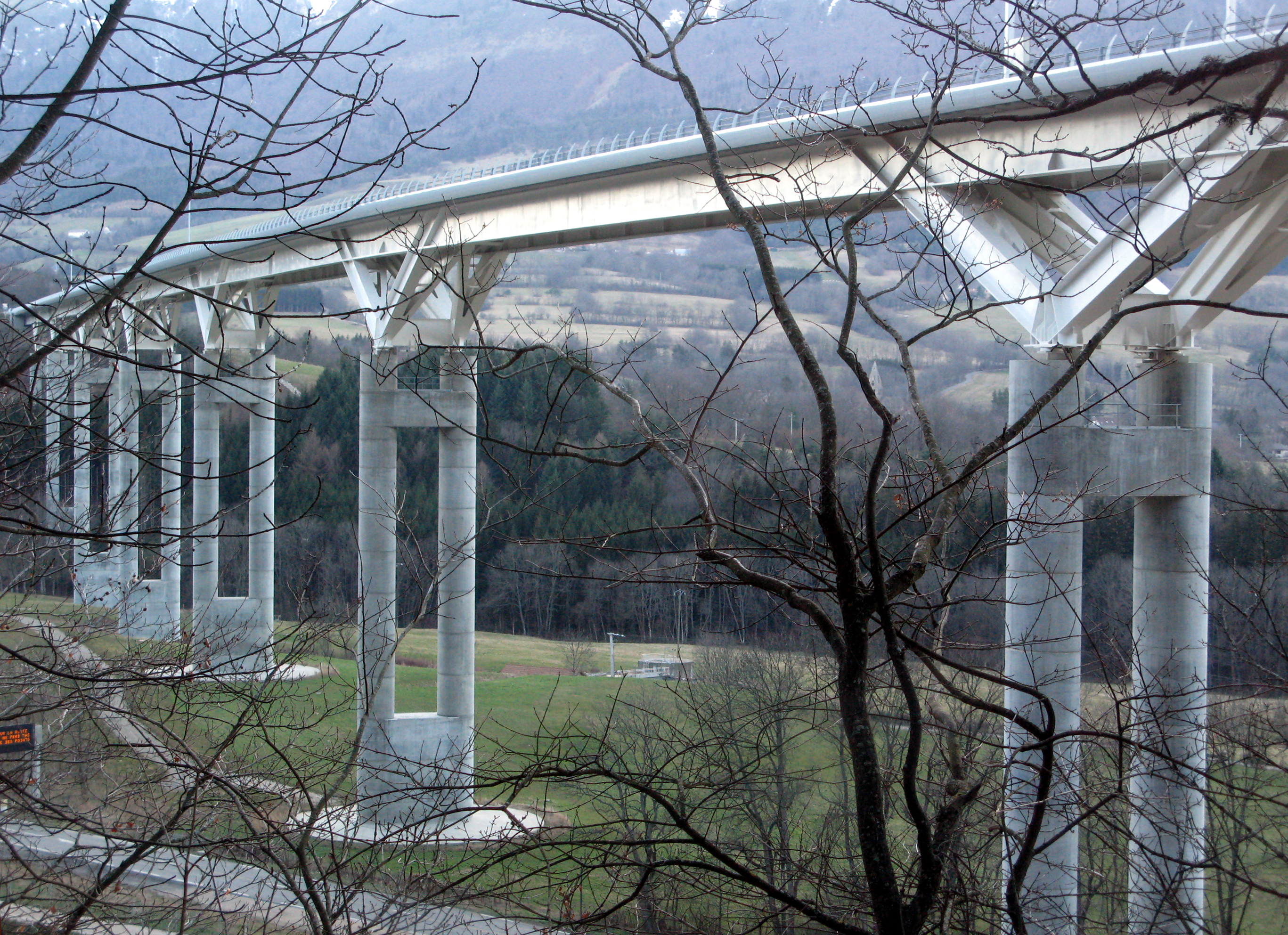 Viaduc de Monestier - autoroute A51 (Isère, France) - Vu de l'intérieur d'une voiture en mouvement sur la route montant à Sinard.